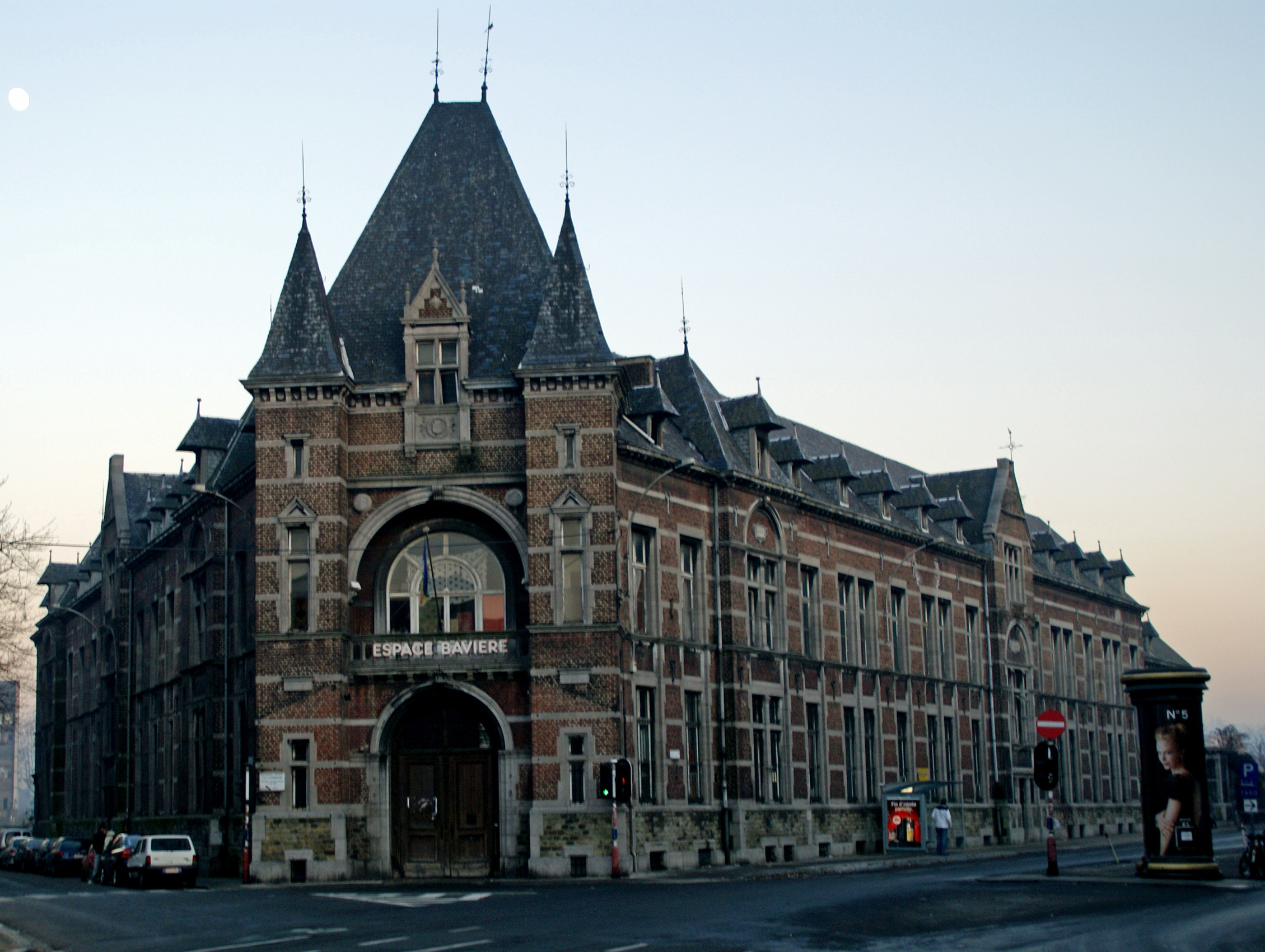 Liège (Belgium) L'ancien hôpital de Bavière, entrée Hospital de Baviera, entrada Toegangspoort van het voormalig de Bavièreziekenhuis Gate from the former hospital de Bavaria